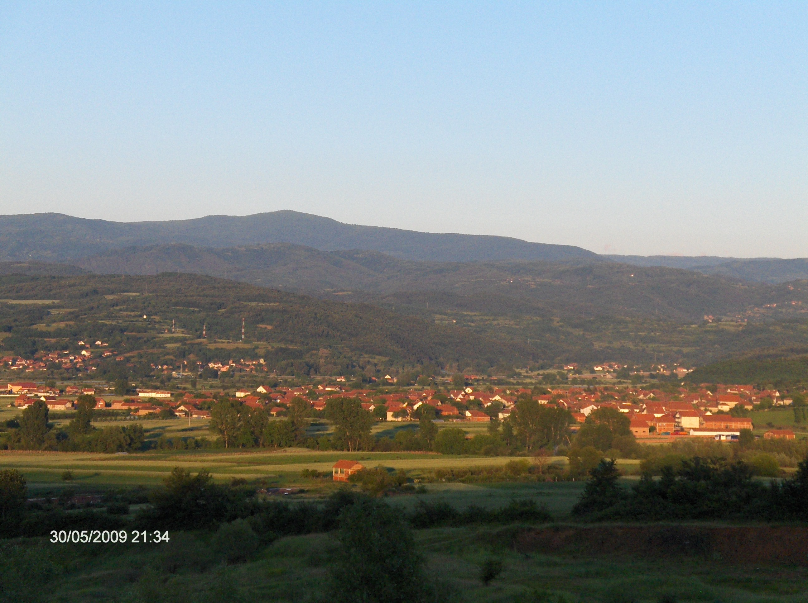 Velika Grabovnica - opština Leskovac. Panorama, pogled na V.Grabovnicu i dolinu Južne Morave, kapija prelepe Grdeličke klisure. autor Dejan Ilić Matkin